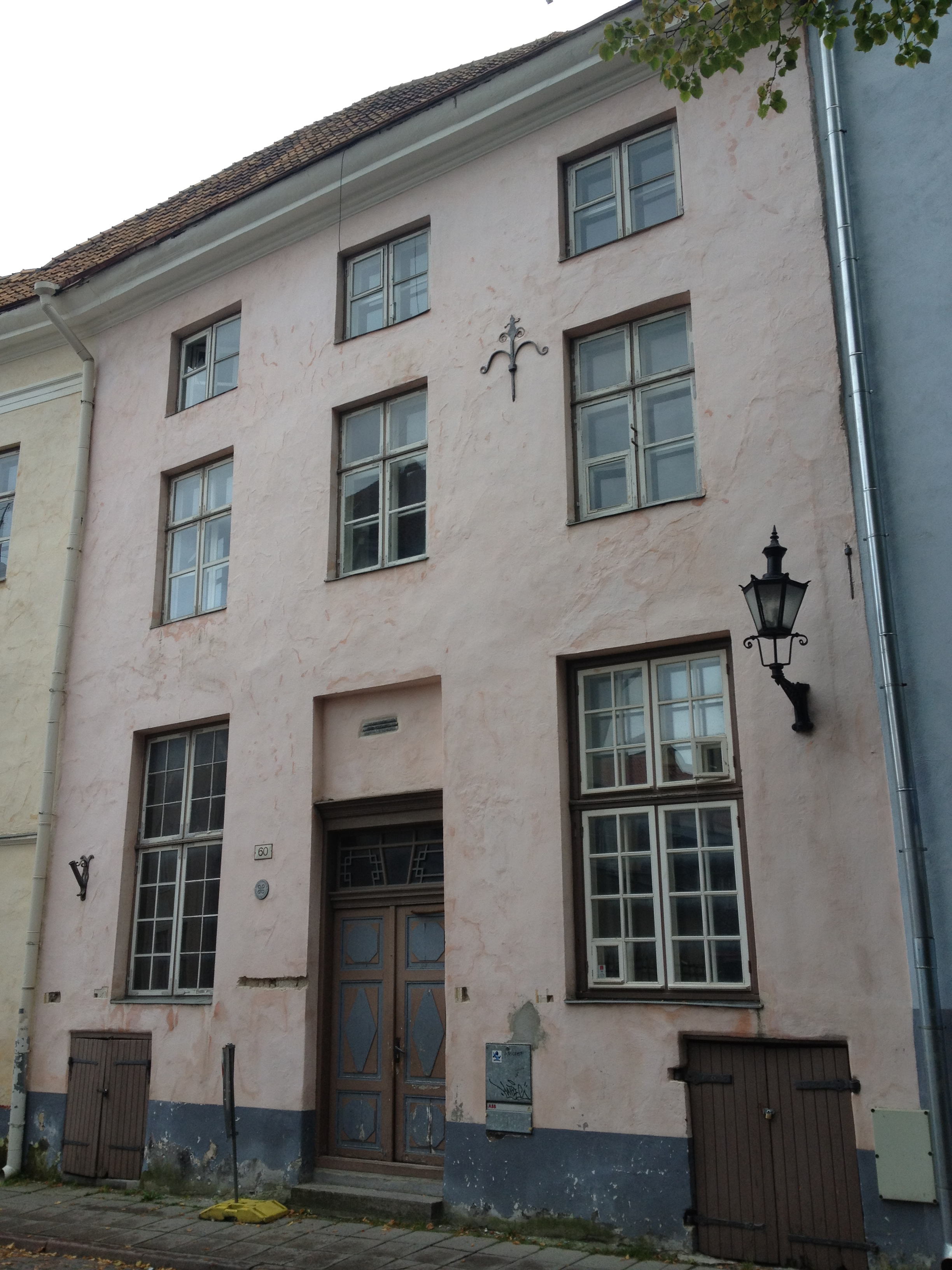 Elamu Pikk tn 60, 15.-19.saj.